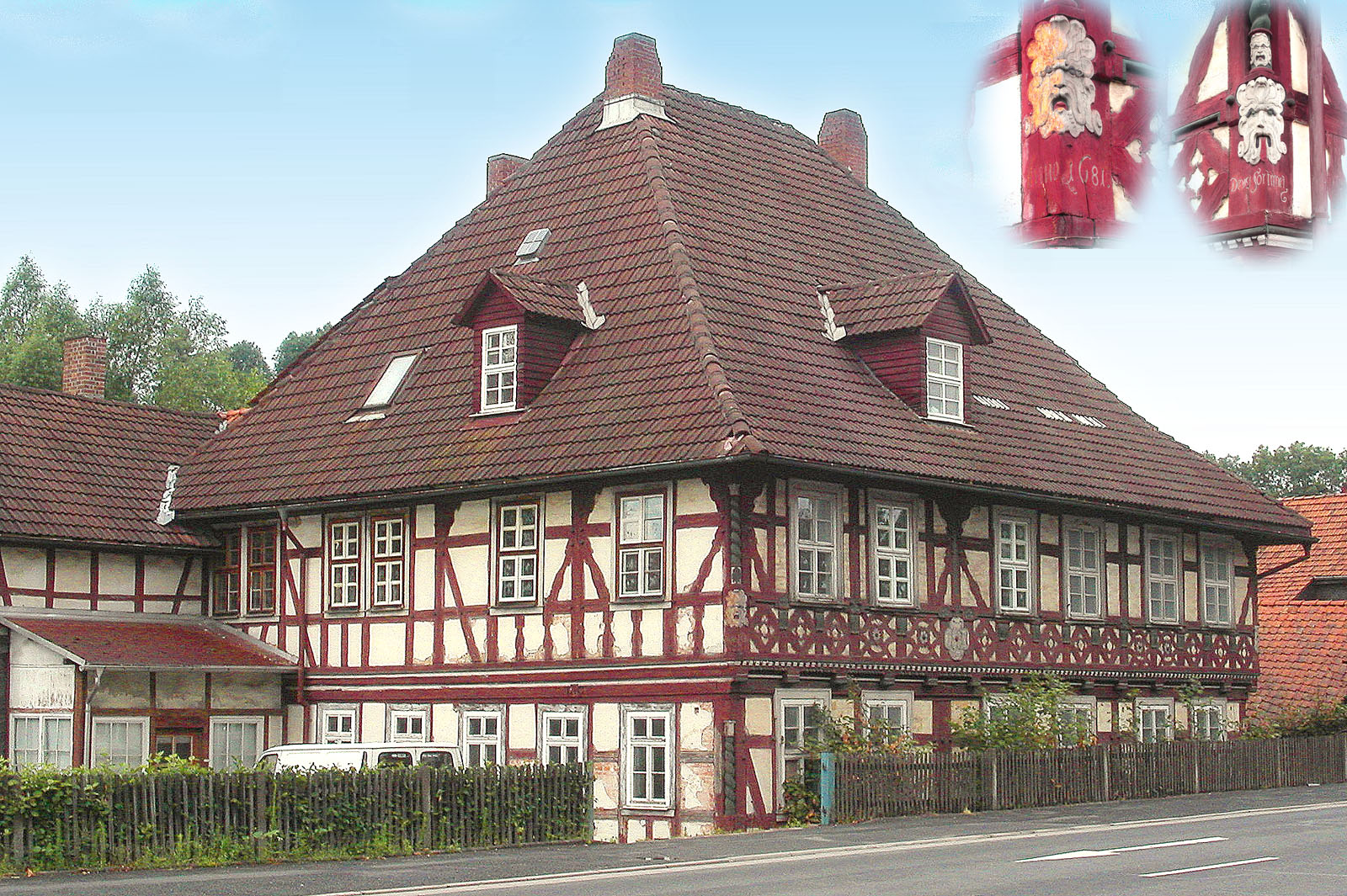 Schleusingen, ehemalige "Teutsche Schule", hennebergisch-fränkisches Fachwerkhaus, erbaut 1681, später an heutigen Standort umgesetzt